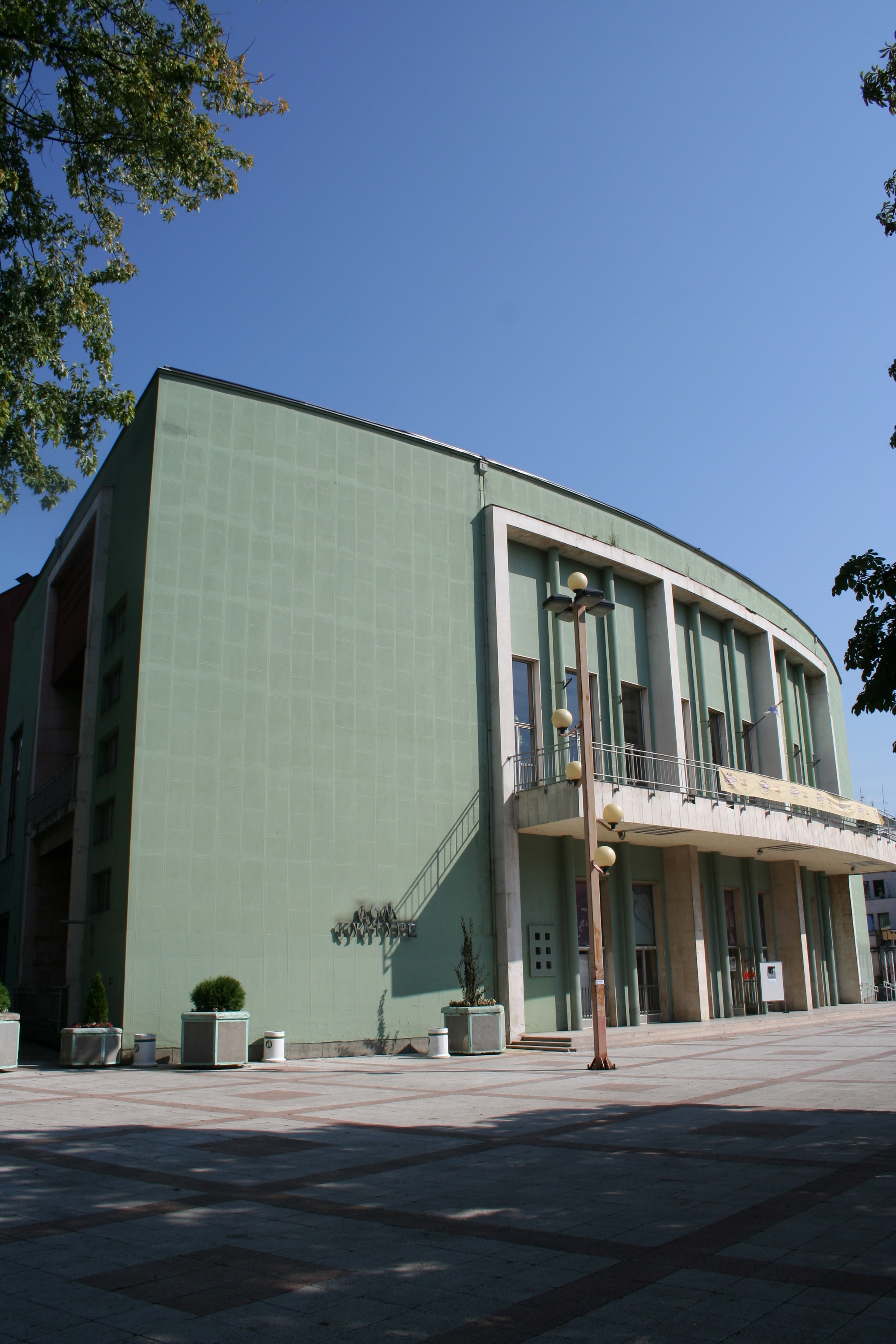 Dom kulture Valjevo